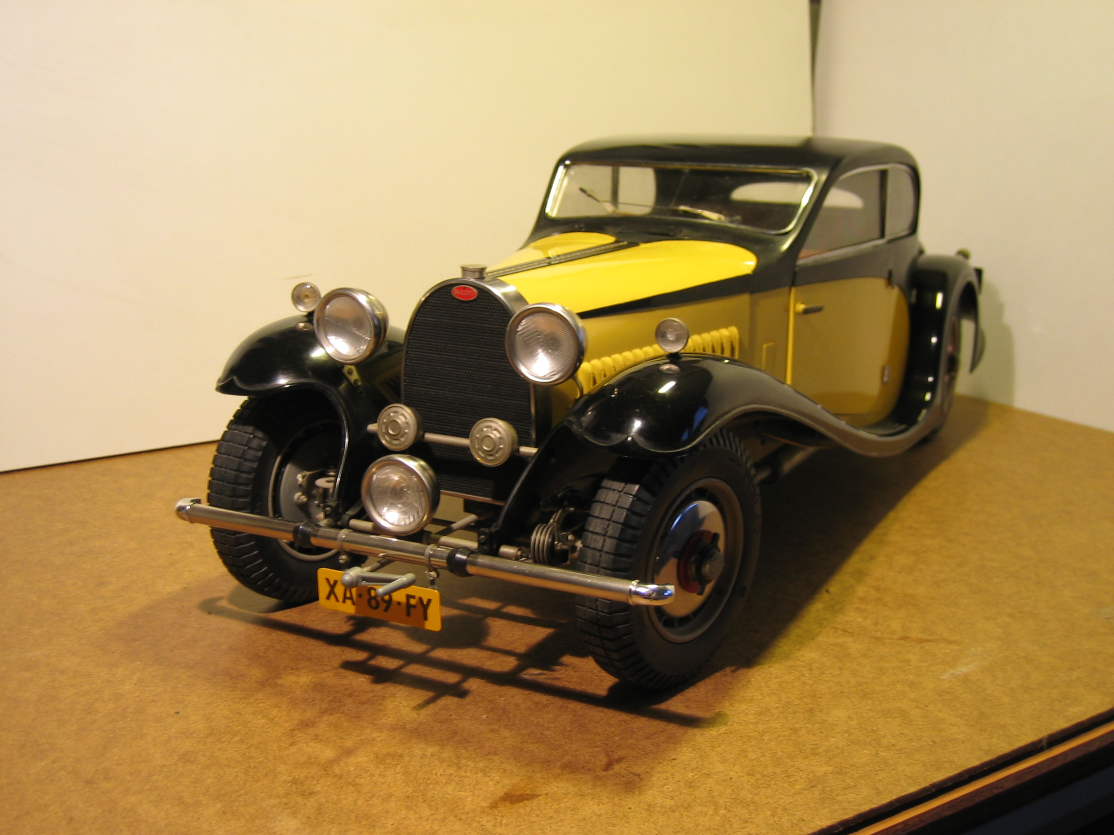 eigen foto